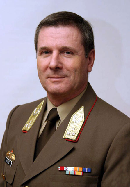 Benkő Tibor vezérezredes, az MH ÖHP parancsnoka (2009-2010), a HM Honvéd Vezérkar főnöke (2010-től).